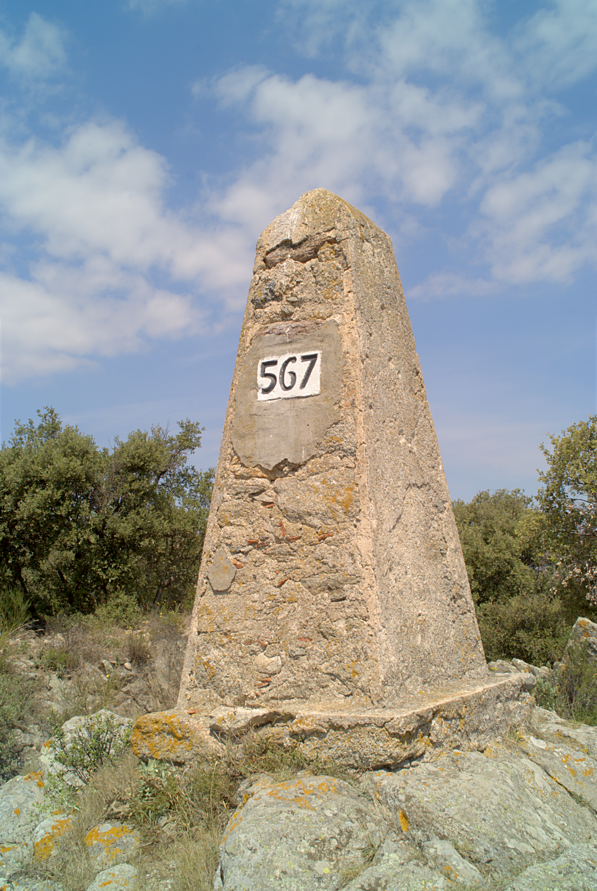 Borne frontière n° 567, Site arquéologique, Col de Panissars, Le Perthus (Pyrénées-Orientales, Languedoc-Roussillon, France), La Jonquera (Haut-Ampurdan, Catalogne, Espagne)